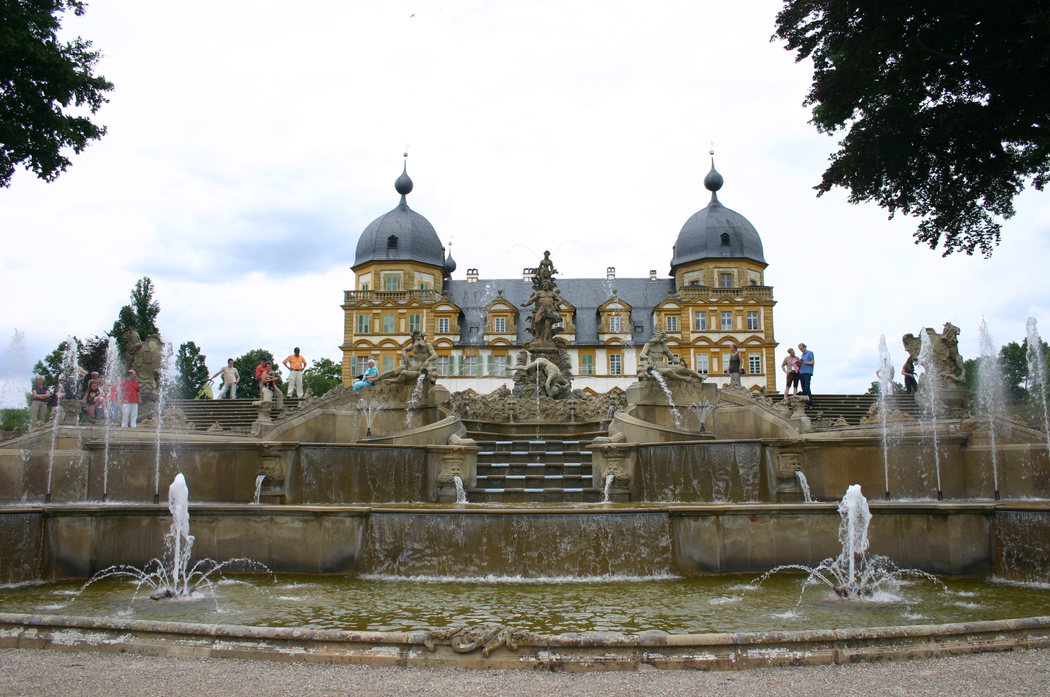 Schloß Seehof, im Vordergrund Kaskade